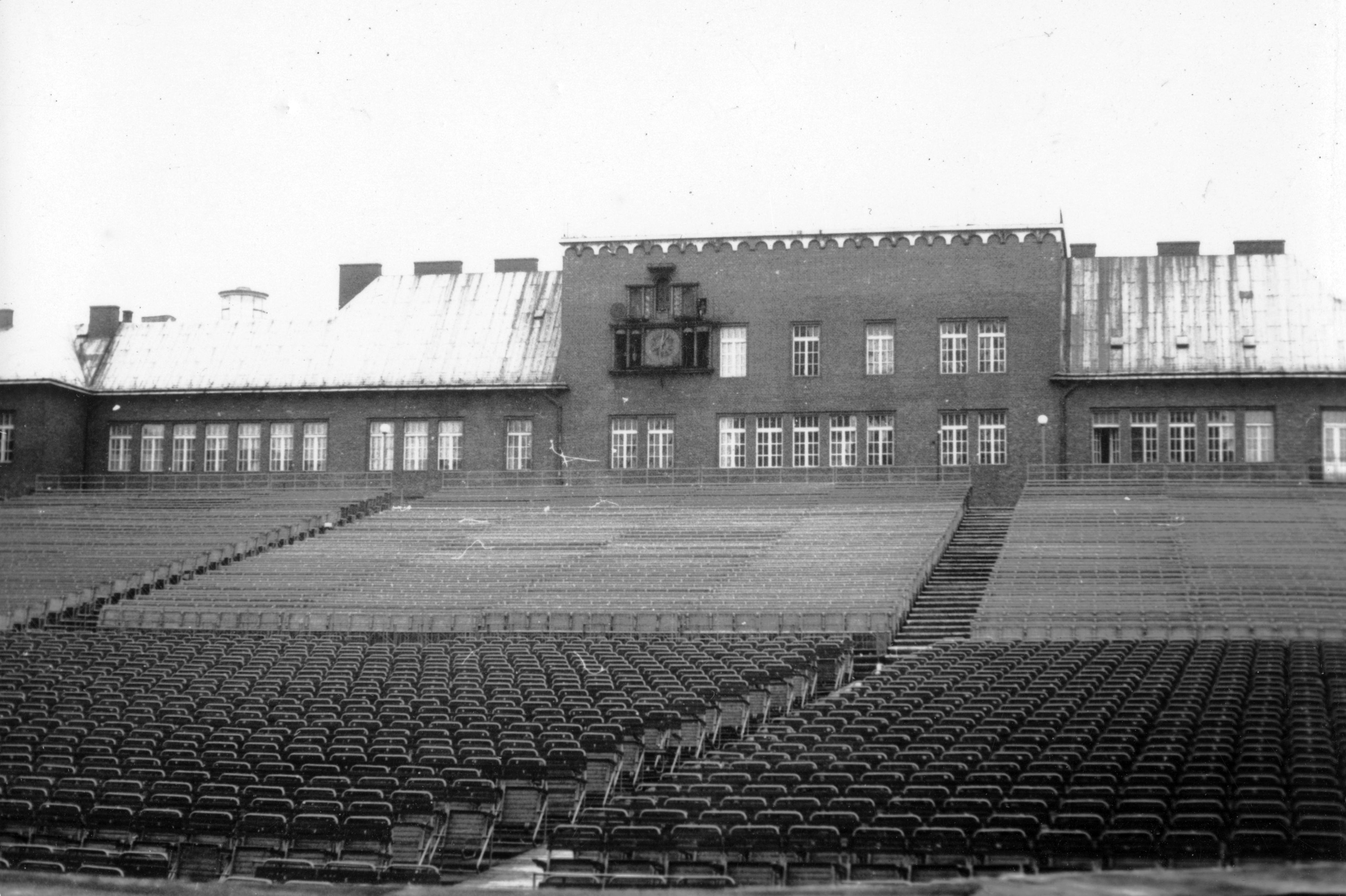 Dóm tér, a szabadtéri játékok nézőtere. Location: Hungary, Szeged Tags: auditorium Title: Dóm tér, a szabadtéri játékok nézőtere.